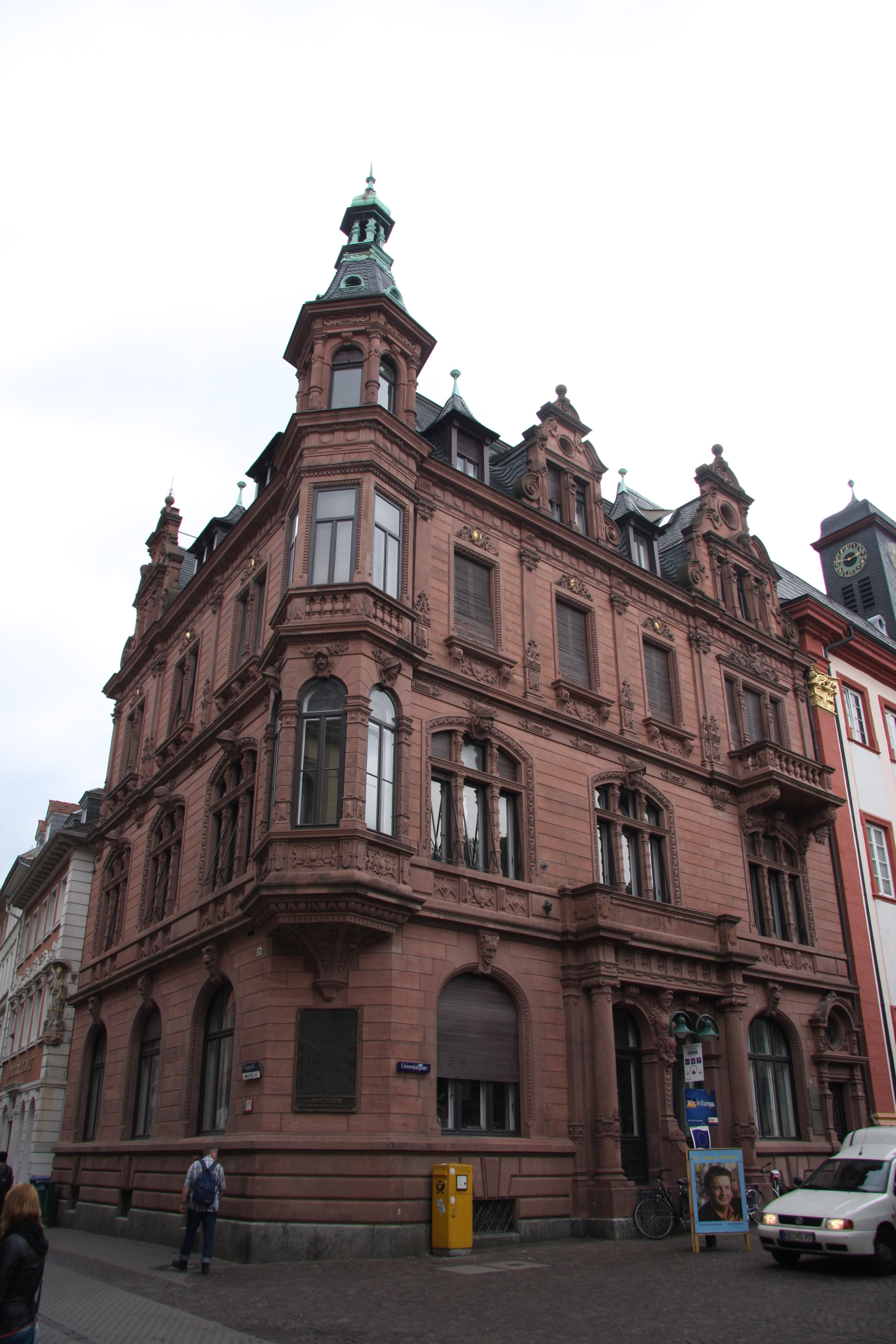 Mitteltor, Heidelberg central gate